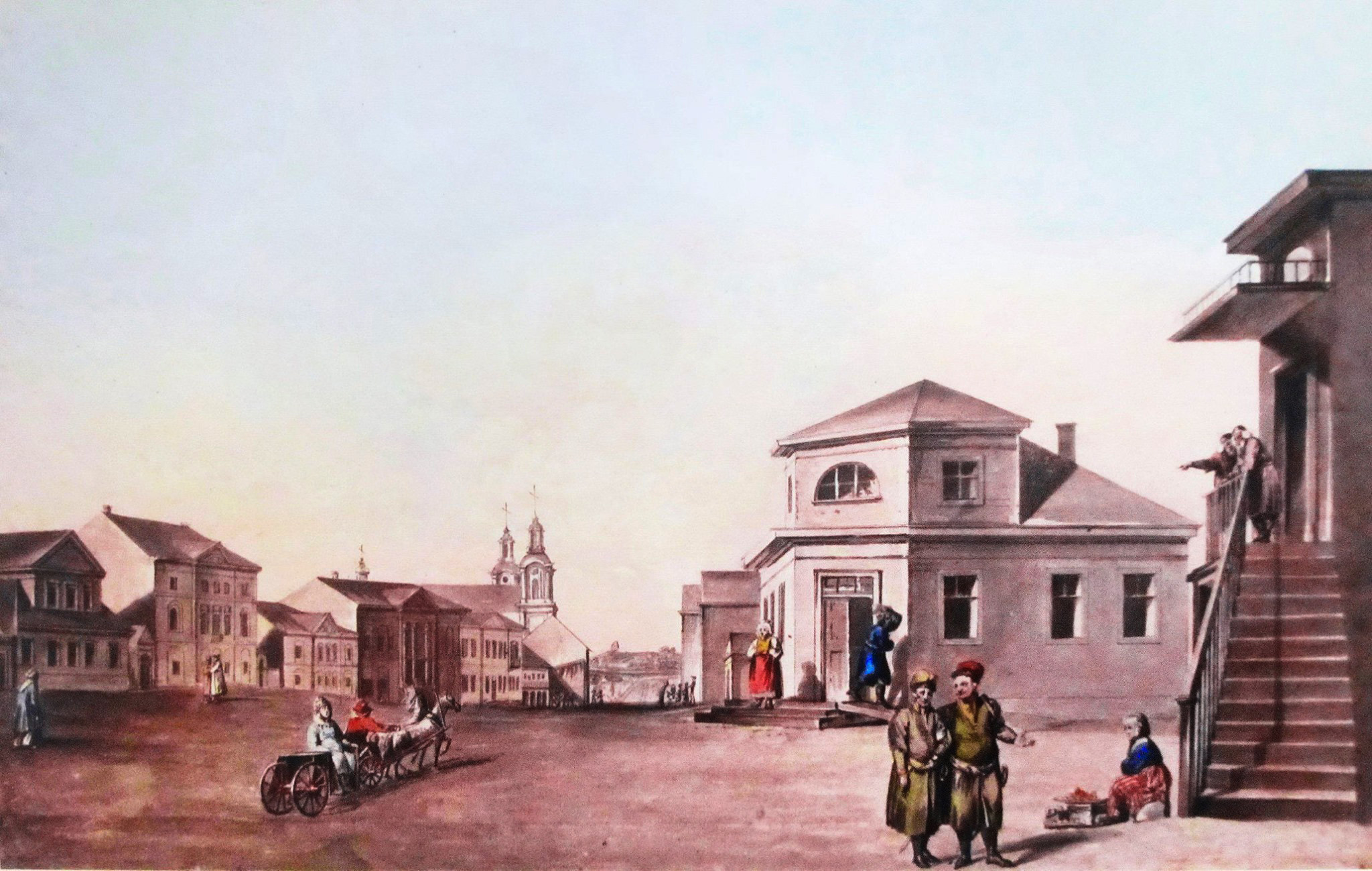 Беларуская (тарашкевіца): Віцебск (Viciebsk), вуліца Вялікая (vulica Vialikaja)